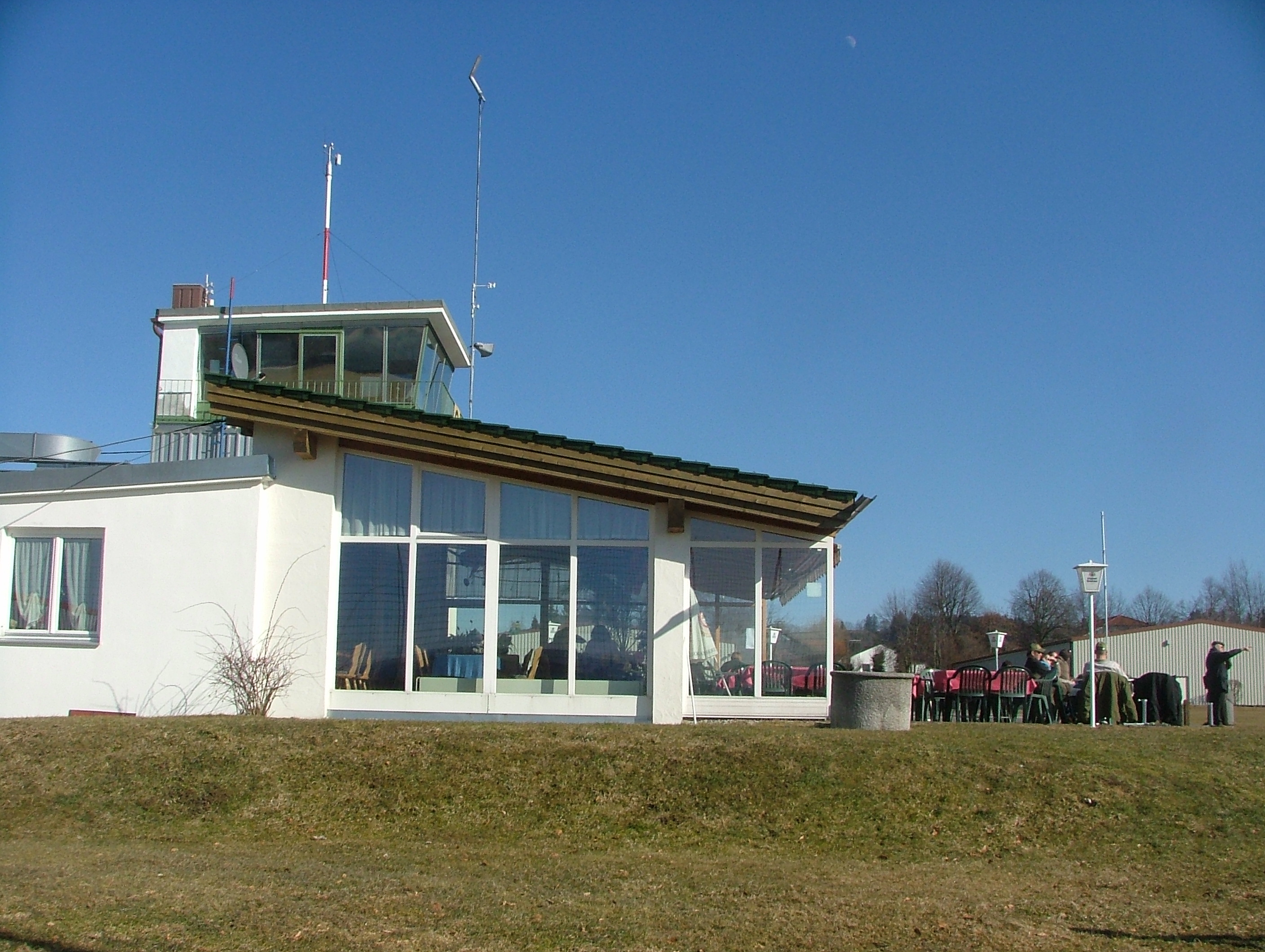 Durach